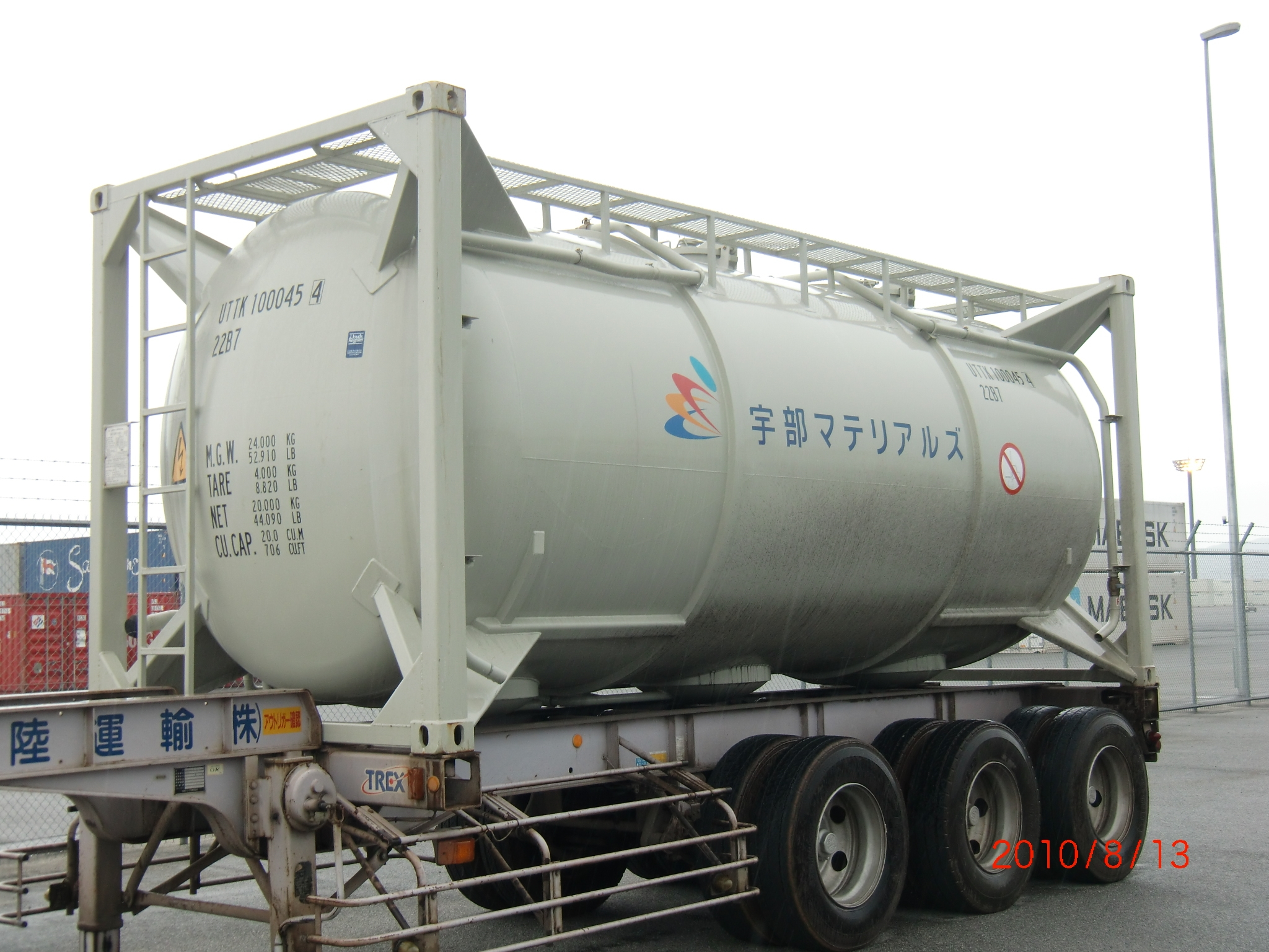 山口宇部港 ⇔ 大分港での『 石灰石 』輸送用に、『 宇部マテリアル 』が所有している20ft型、バルクコンテナ。 ※コンテナタイプコード ( 22B7 ) 使用。 【 大分県／大分港大在コンテナターミナルにて 】